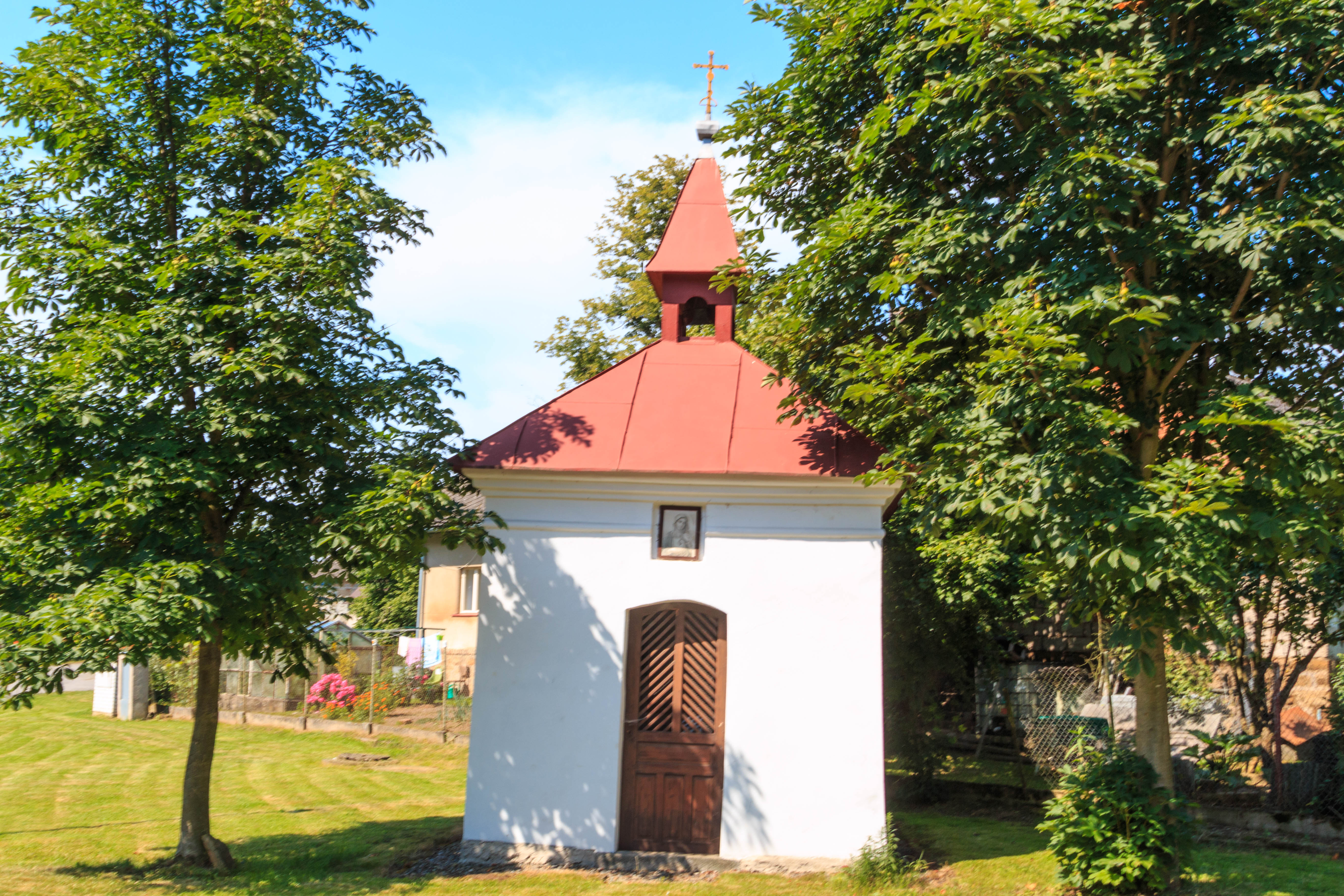 Jilemník kaple